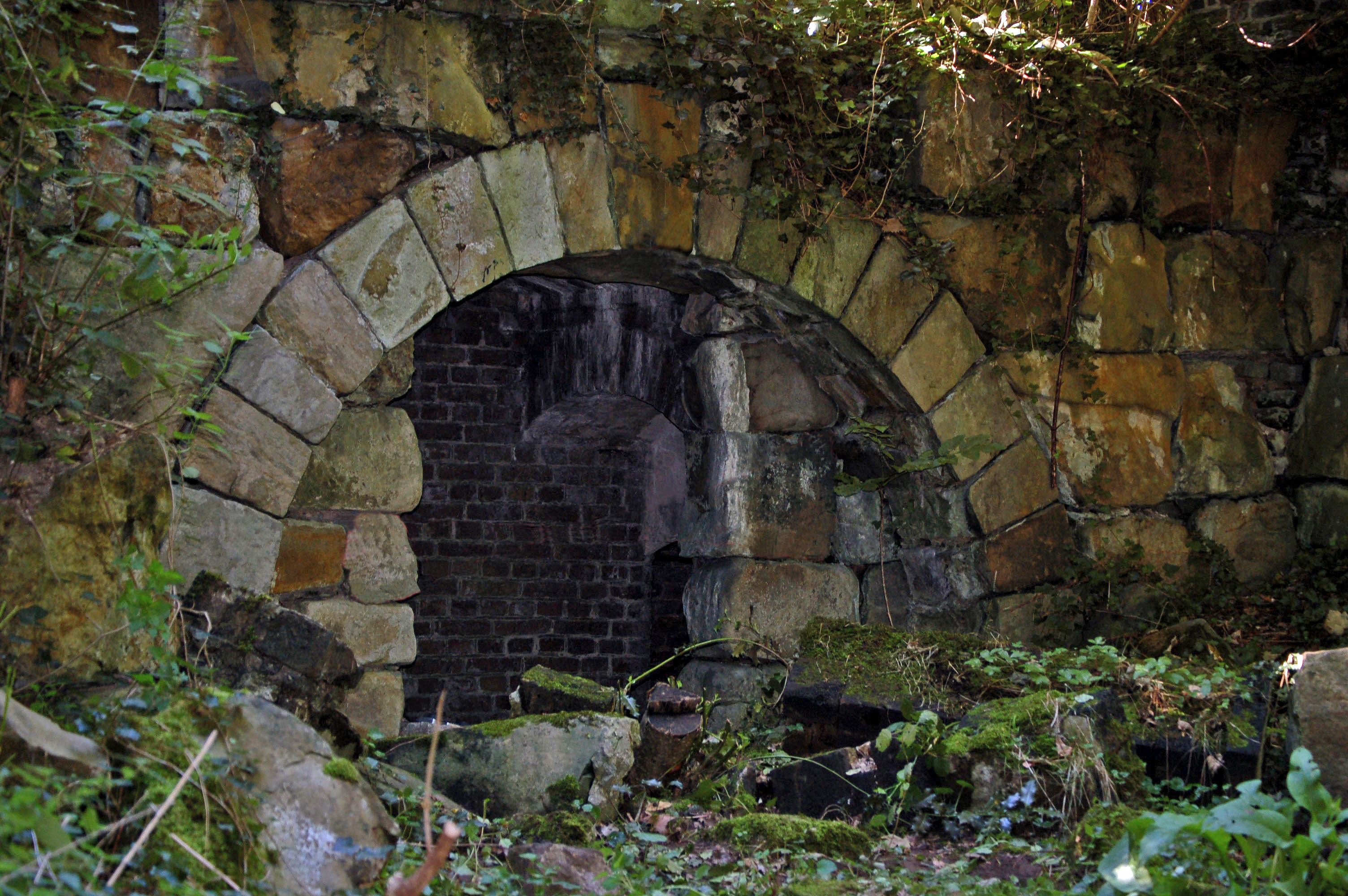 Eingang zum Eiskeller auf dem Gelände Haus Meer in Meerbusch